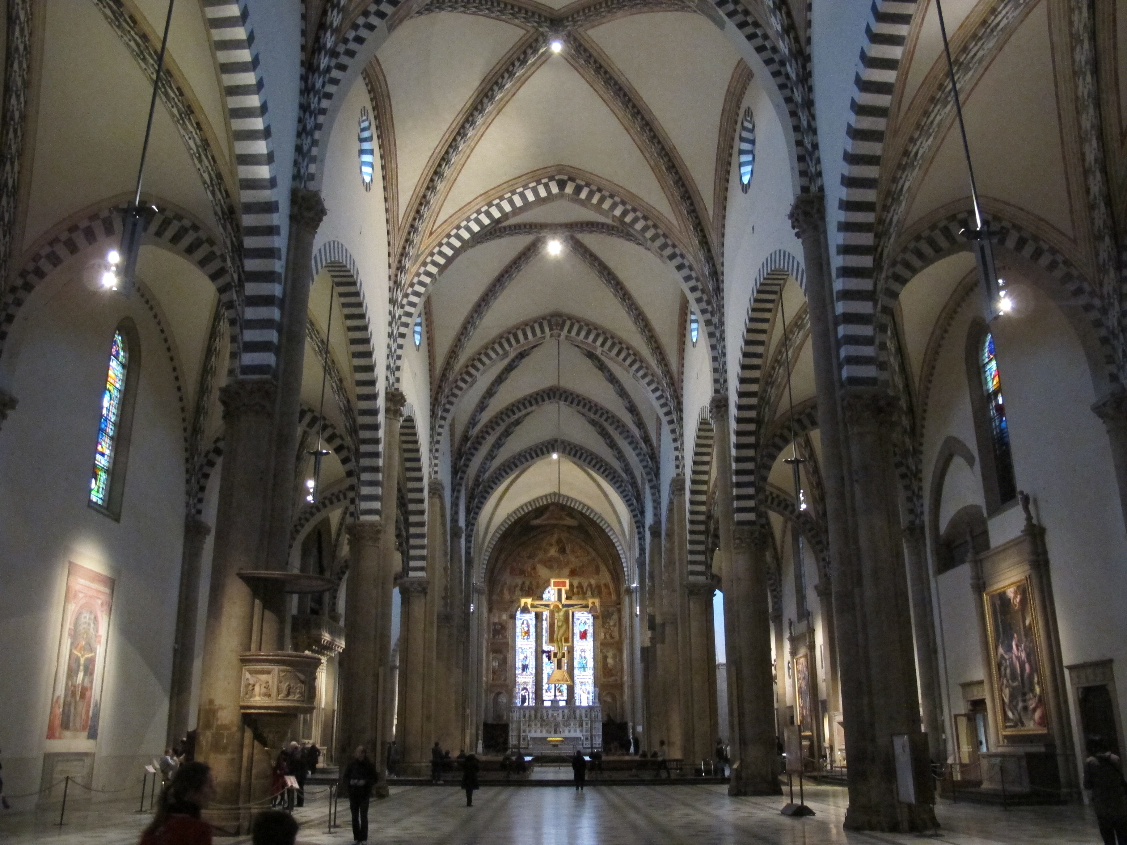 Smn, navata centrale